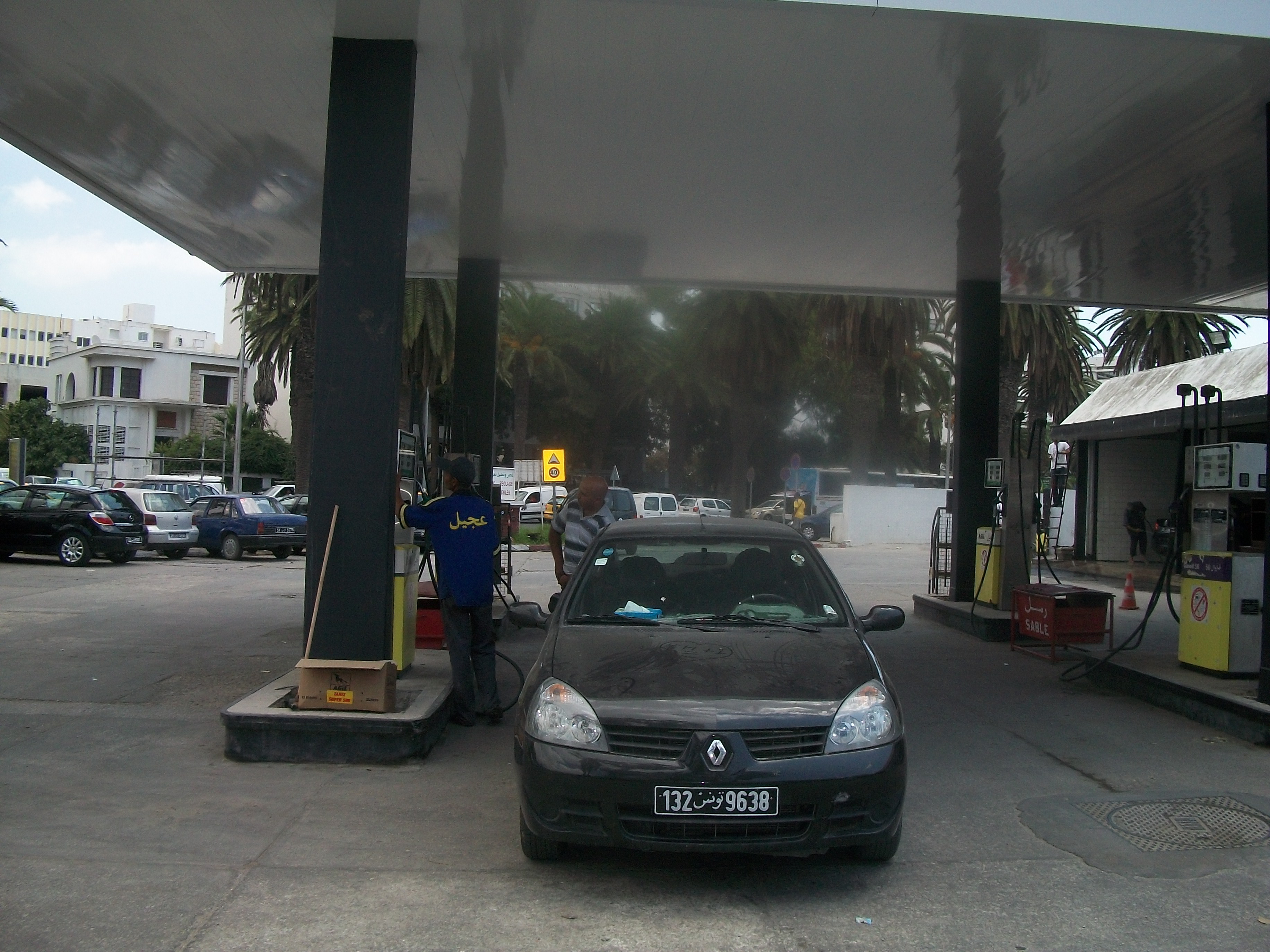 [Magharebia/Houda Trabelsi] Working petrol pumps are hard to find in southern Tunisia. أصبحت محطات البنزين العاملة نادرة في الجنوب التونسي Il devient difficile de trouver des pompes à pétrole en fonctionnement dans le sud tunisien.